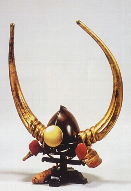 黒田長政所用「黒漆塗桃形大水牛脇立兜(くろうるしぬりももなりだいすいぎゅうわきだてかぶと)」